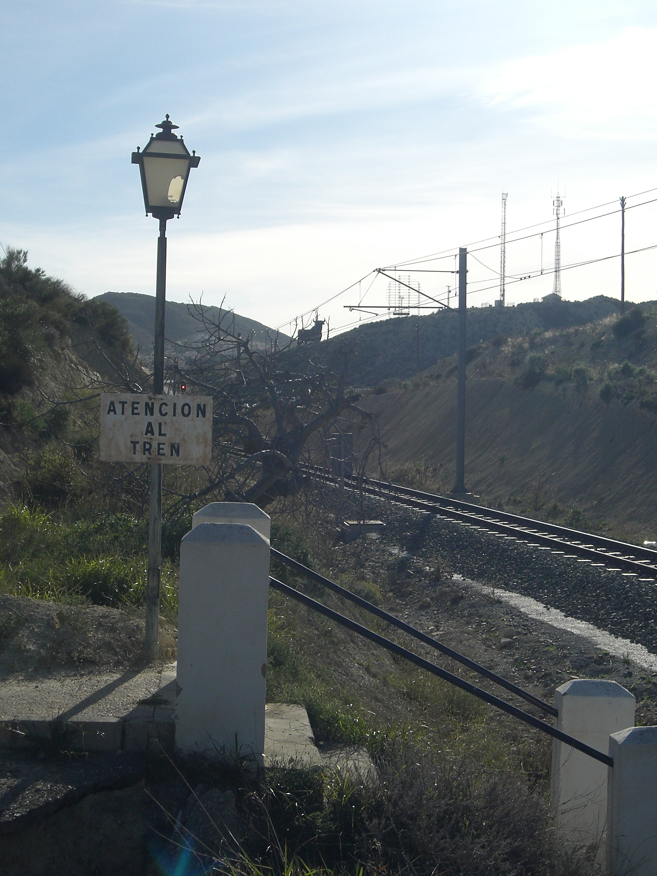 El Campello (Alacantí). Pas dels trens de Ferrocarils de la Generalitat Valenciana (FGV).